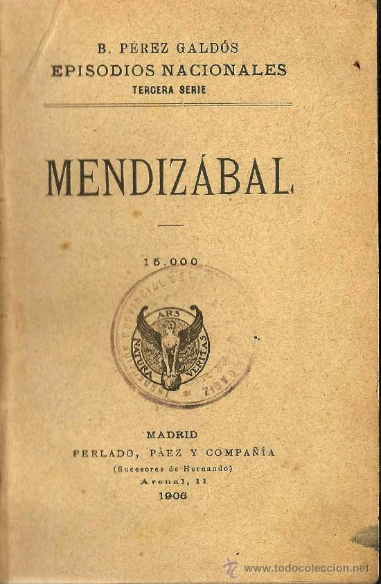 Portada de Mendizábal de Benito Pérez Galdós (Madrid: Perlado, Páez y Compañía, 1906)